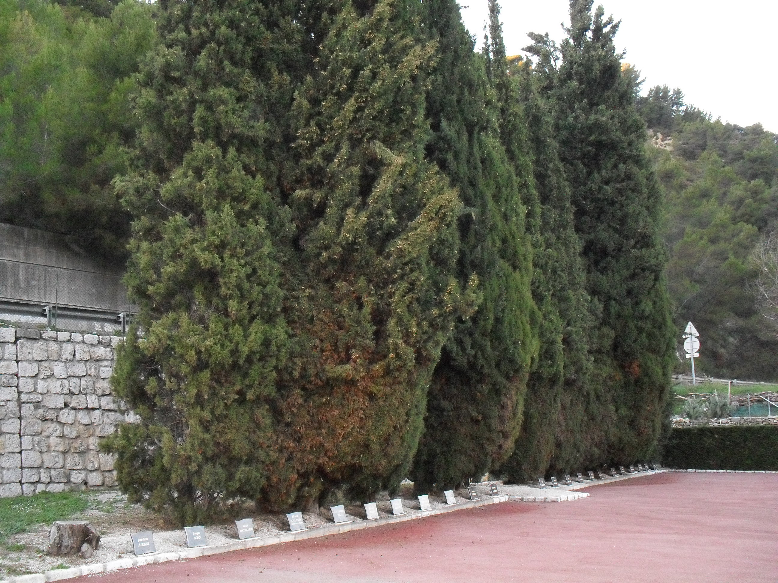 Vue générale de la terrasse gravillonnée du carré des Fusillés de l'Ariane à Nice avec les plaques nominatives des fusillés.